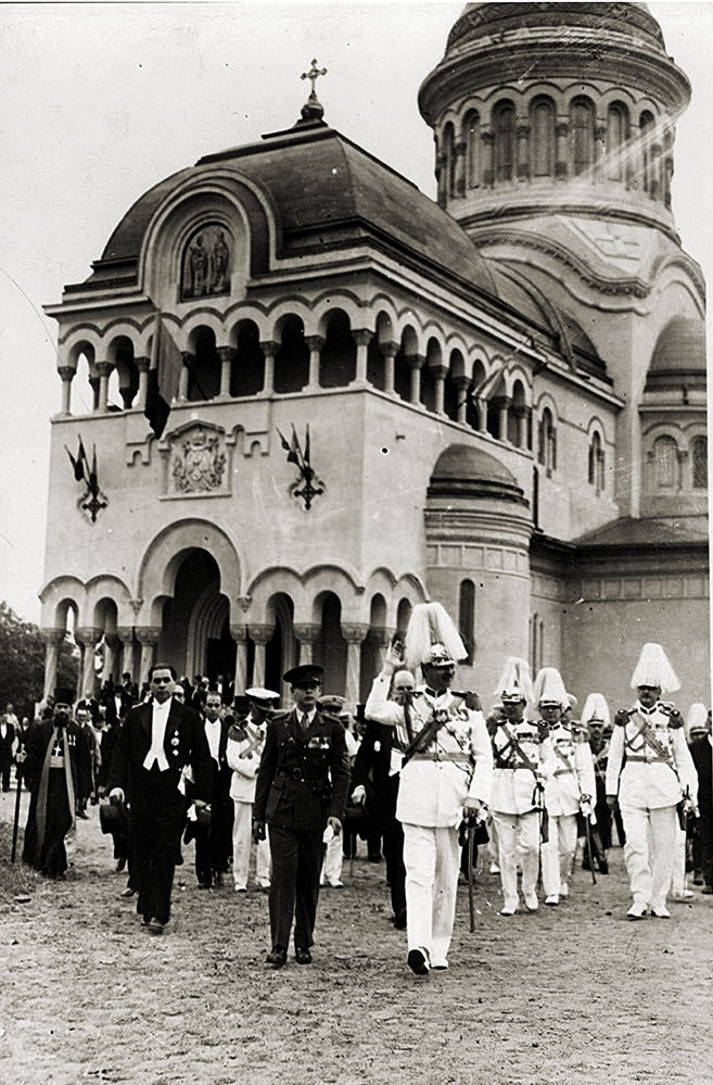 Vizita M. S. Carol II la Bălţi, la sfinţirea Catedralei Sf. Constantin şi Elena